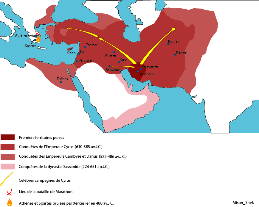 L'étendue de l'Empire Perse au travers des temps.